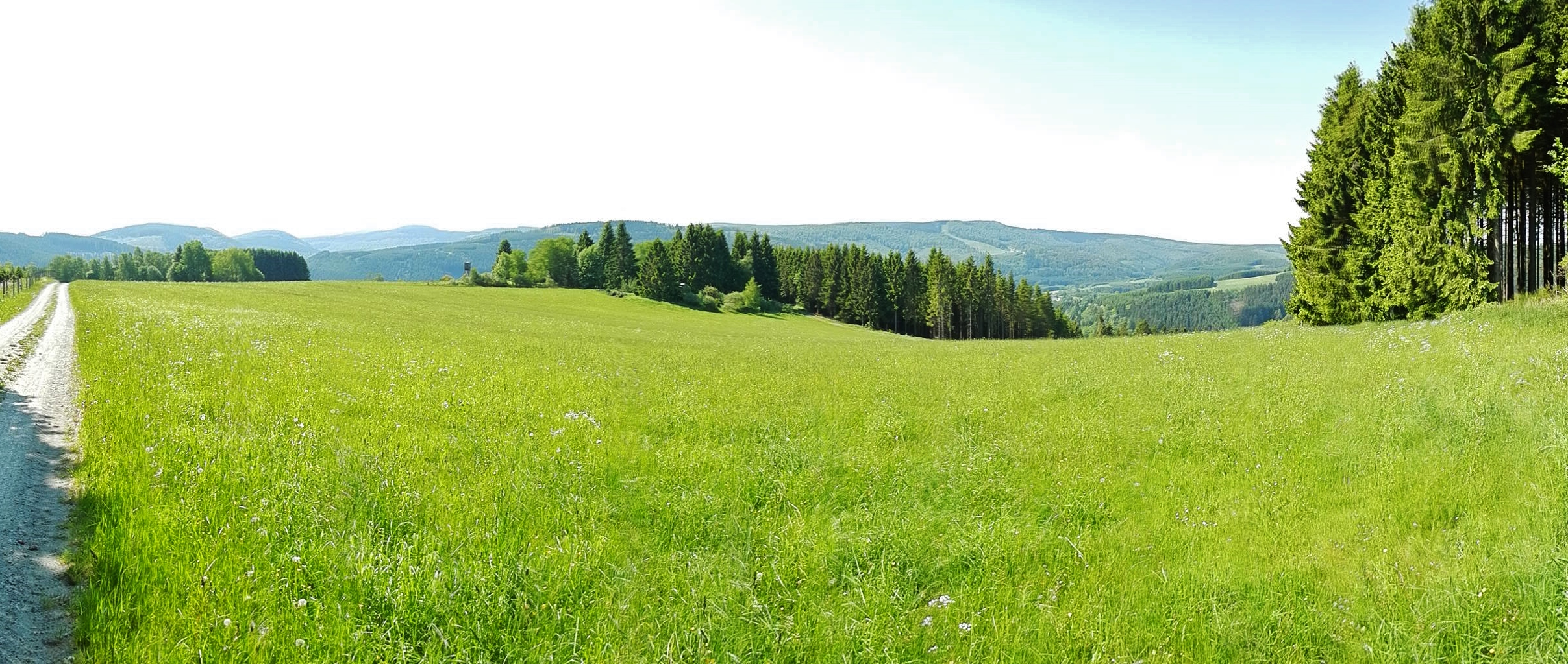 Landschaftsschutzgebiet Offenland um Züschen mit Wald vom LSG Winterberg im Naturpark Rothaargebirge